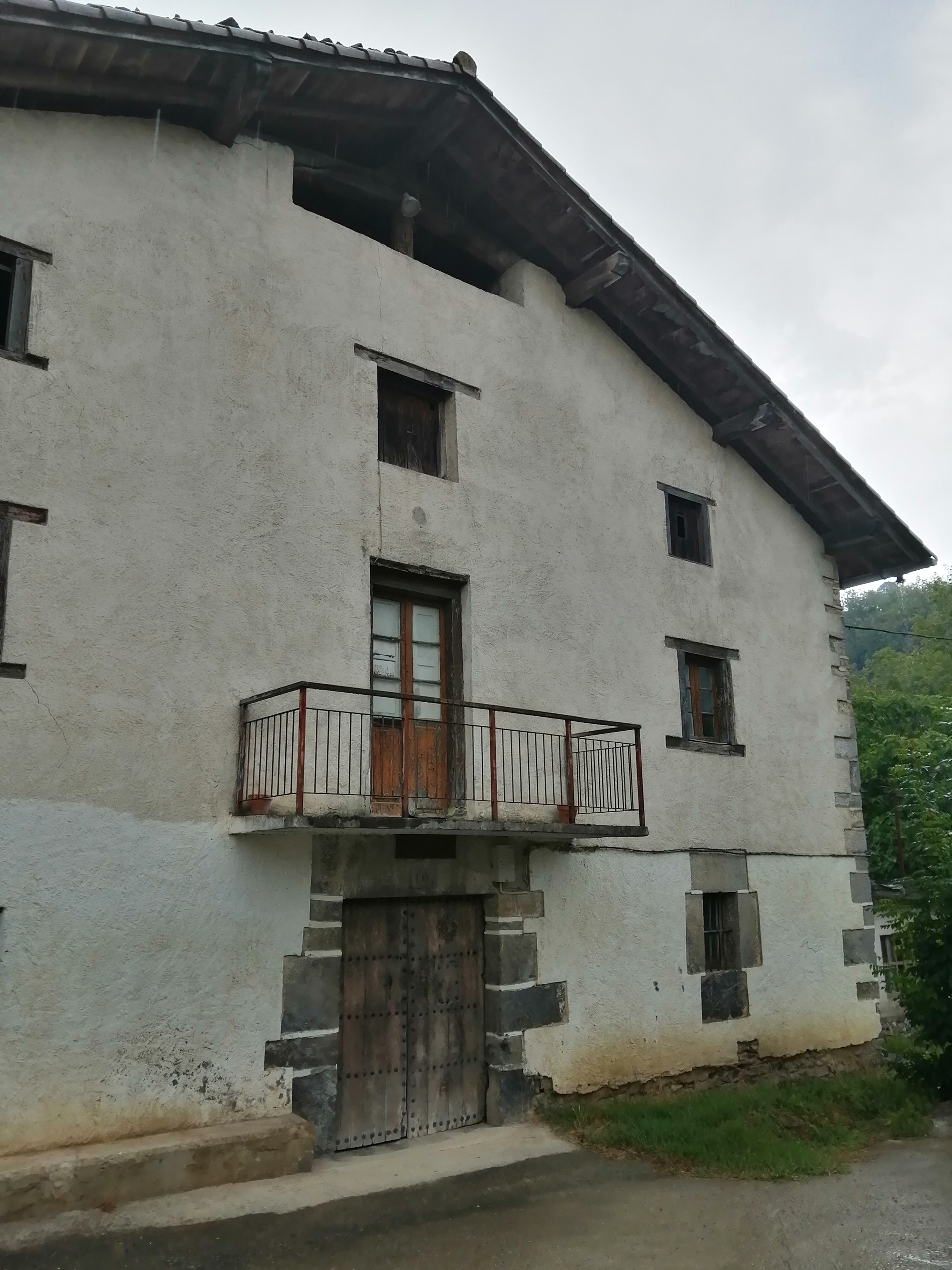 Ipintza Haundi baserria, Altzo